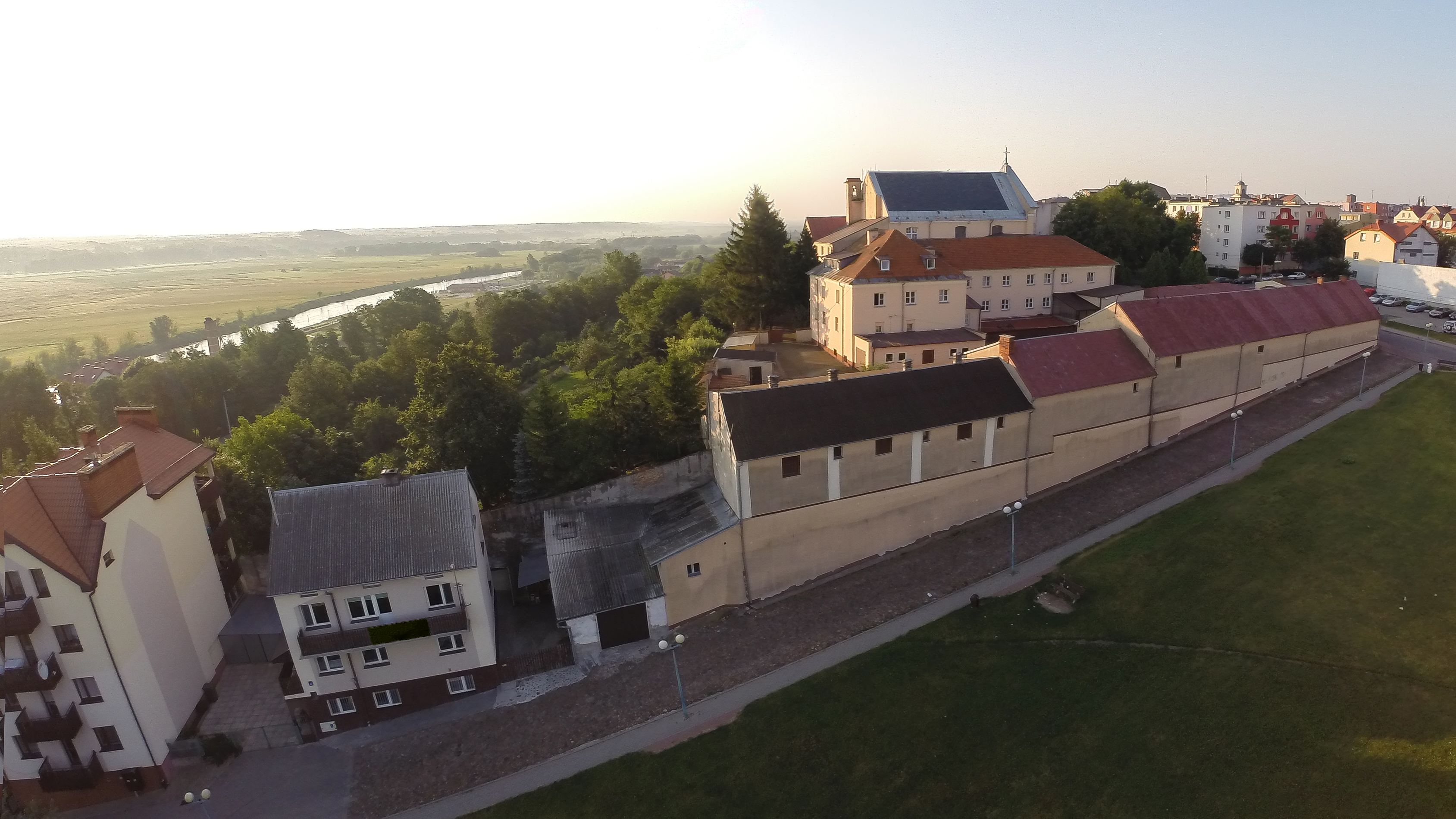 Popowa Góra - widok od zachodniej. Widoczny klasztor o.o. Kapucynów oraz ulica Kapucyńska